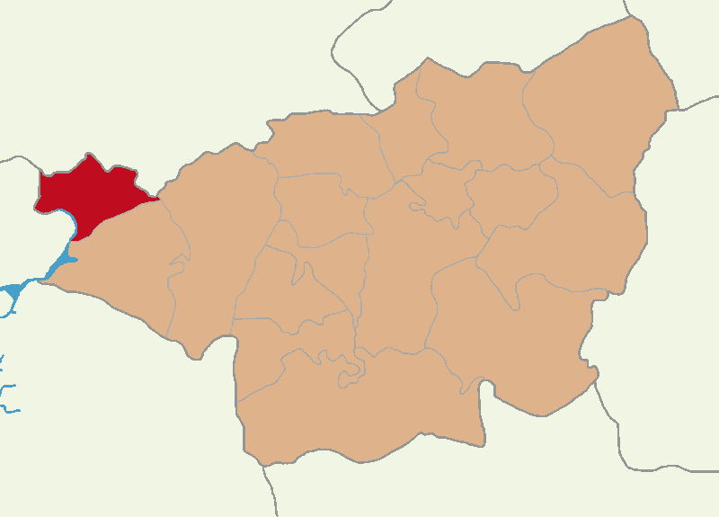 Çüngüş ilçesinin konumu